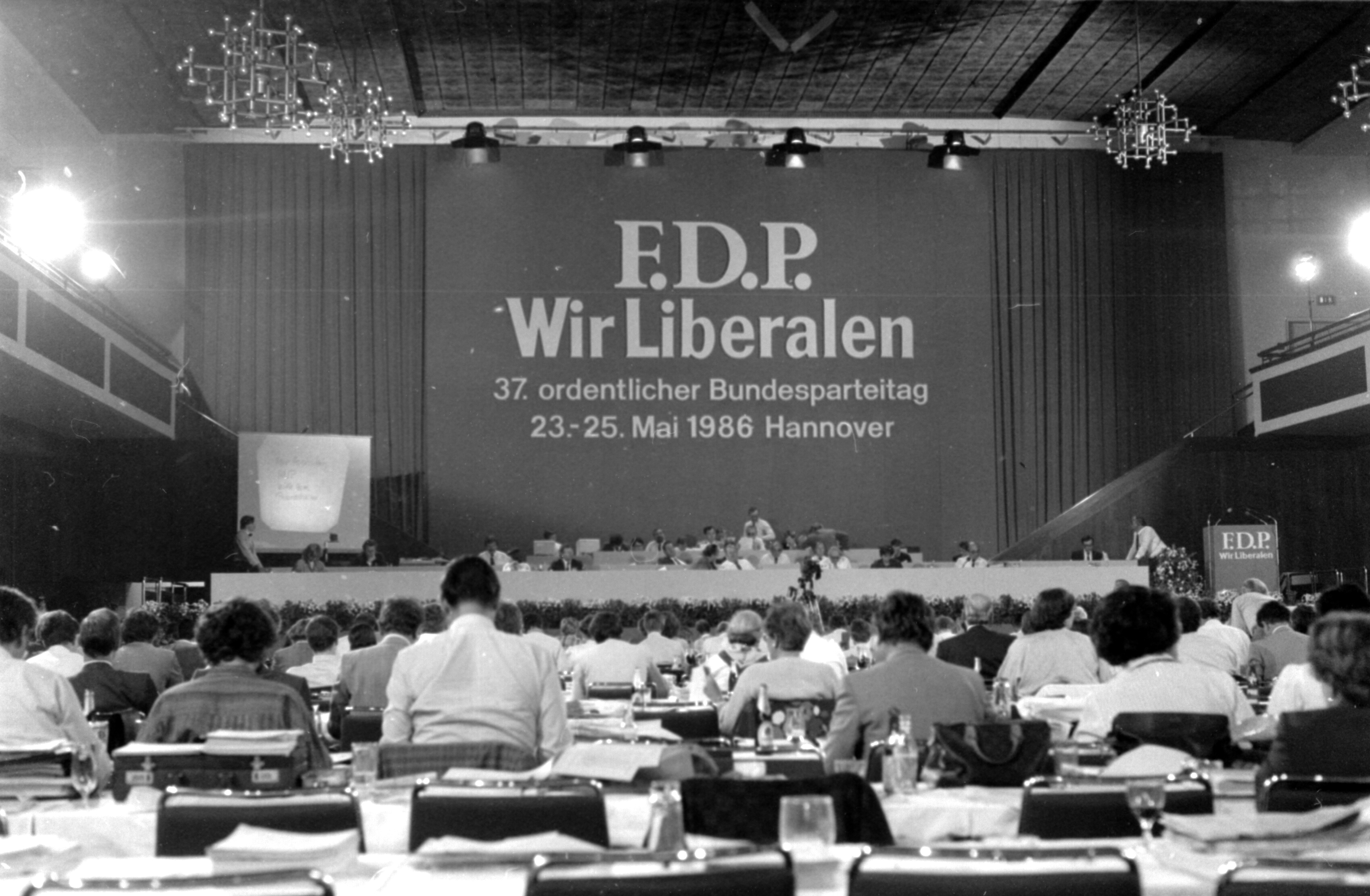 Den außerordentlichen Bundesparteitag Den Bundesparteitag der FDP 1986 hielt die FDP vom 23. bis 25. Mai 1986 in Hannover ab. Es handelte sich um den 37. ordentlichen Bundesparteitag der FDP in der Bundesrepublik Deutschland.